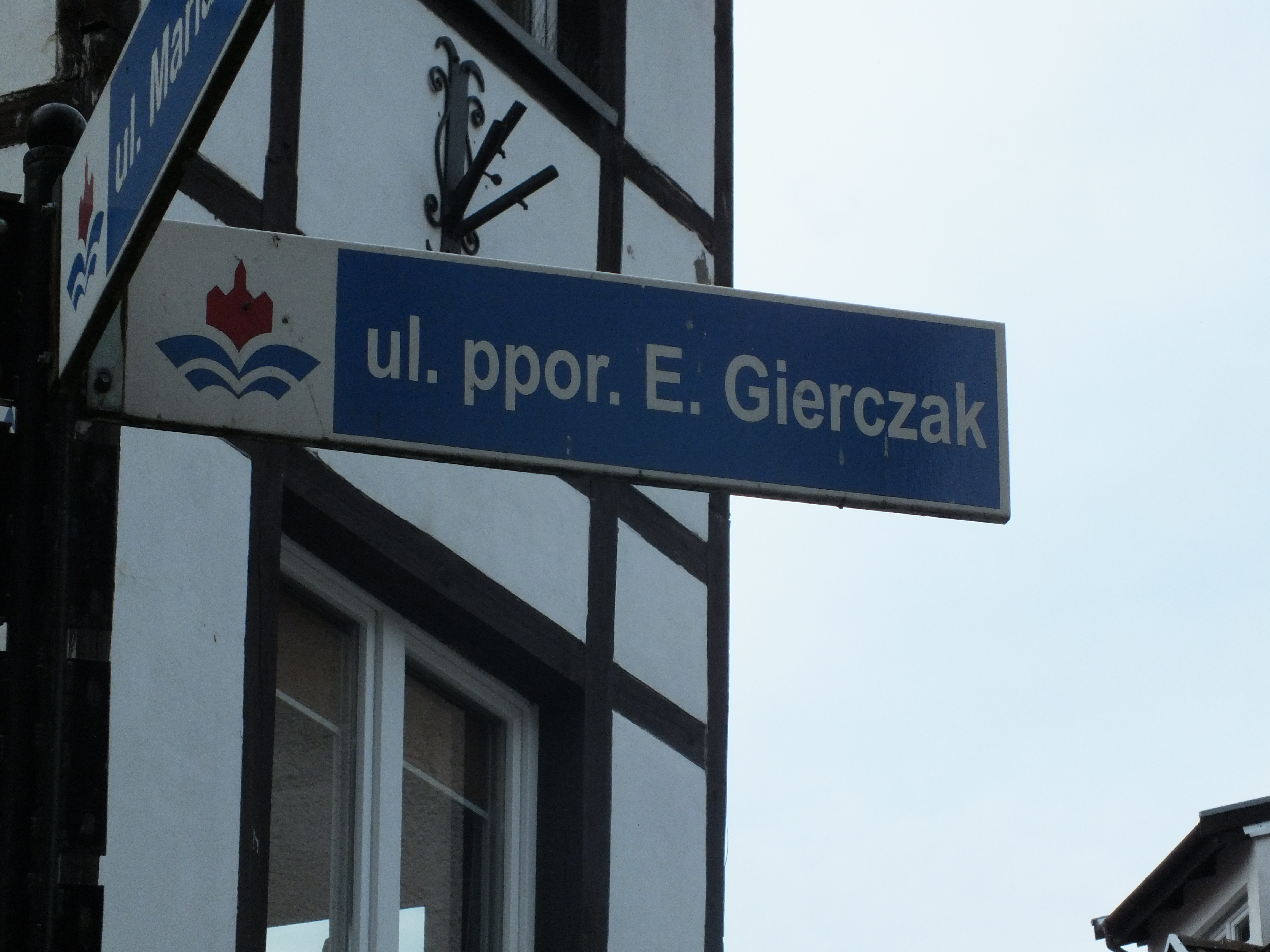 Kołobrzeg, tablica z nazwą ulicy ppor. E. Gierczak